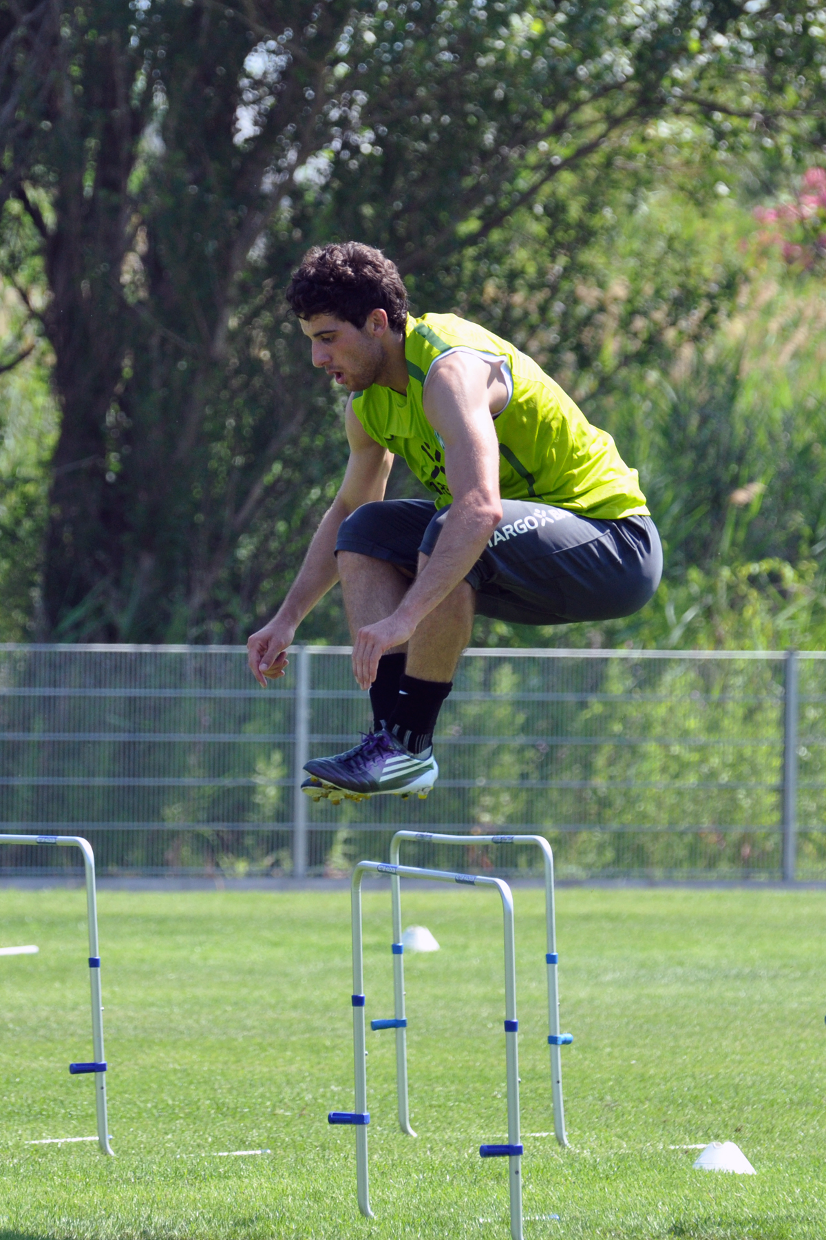 Onur Ayik